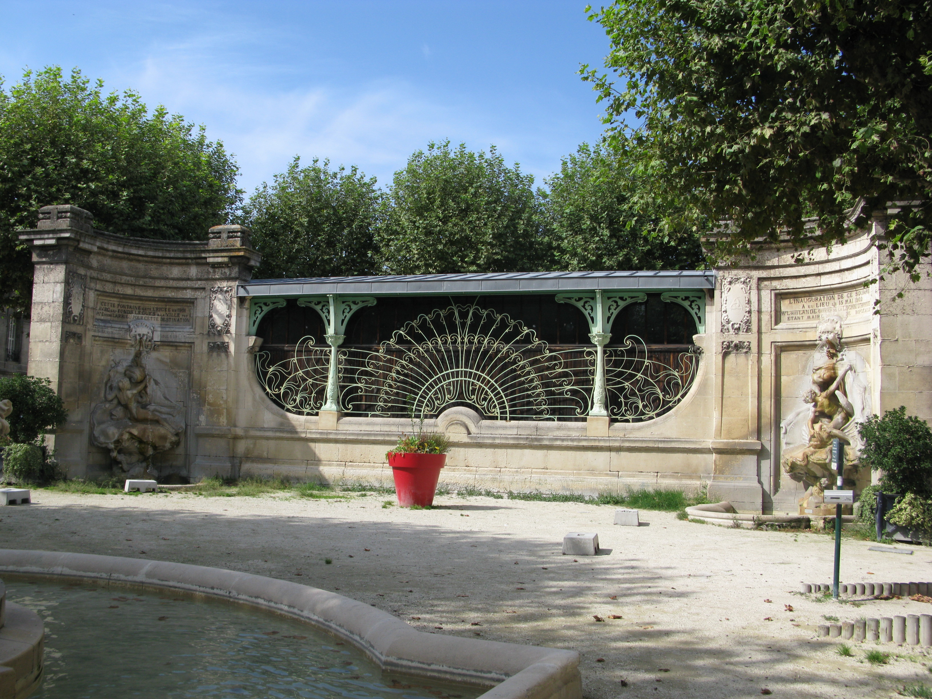 Vue droite de la fontaine transversale de la place Amédée-Larrieu.